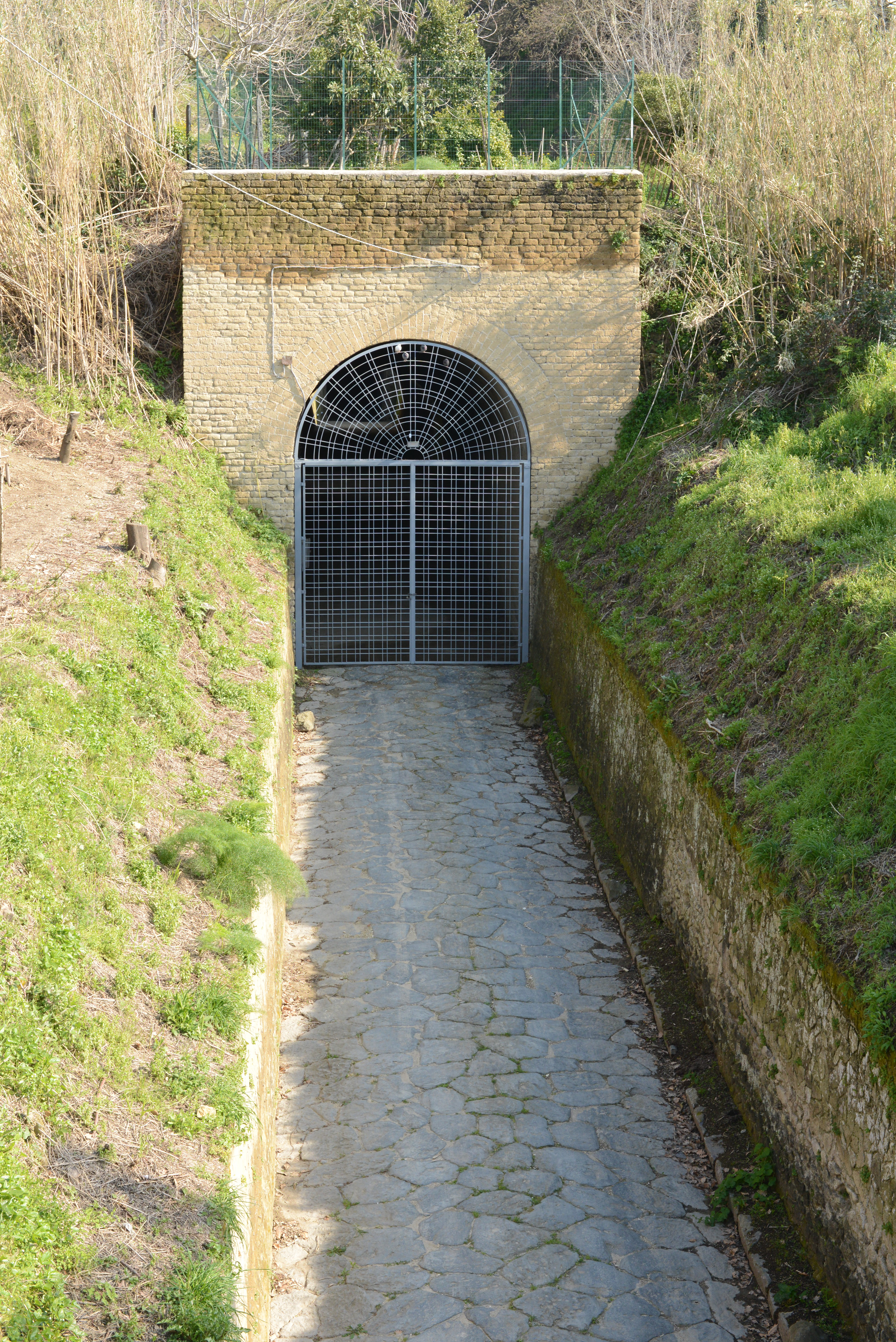 Uscita della Grotta di Cocceio - lato Nord-Ovest